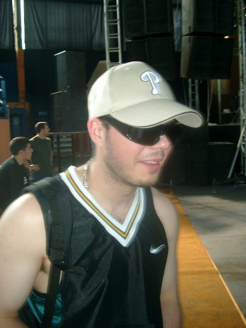 Ivan Ivanović Djus 2007. godine